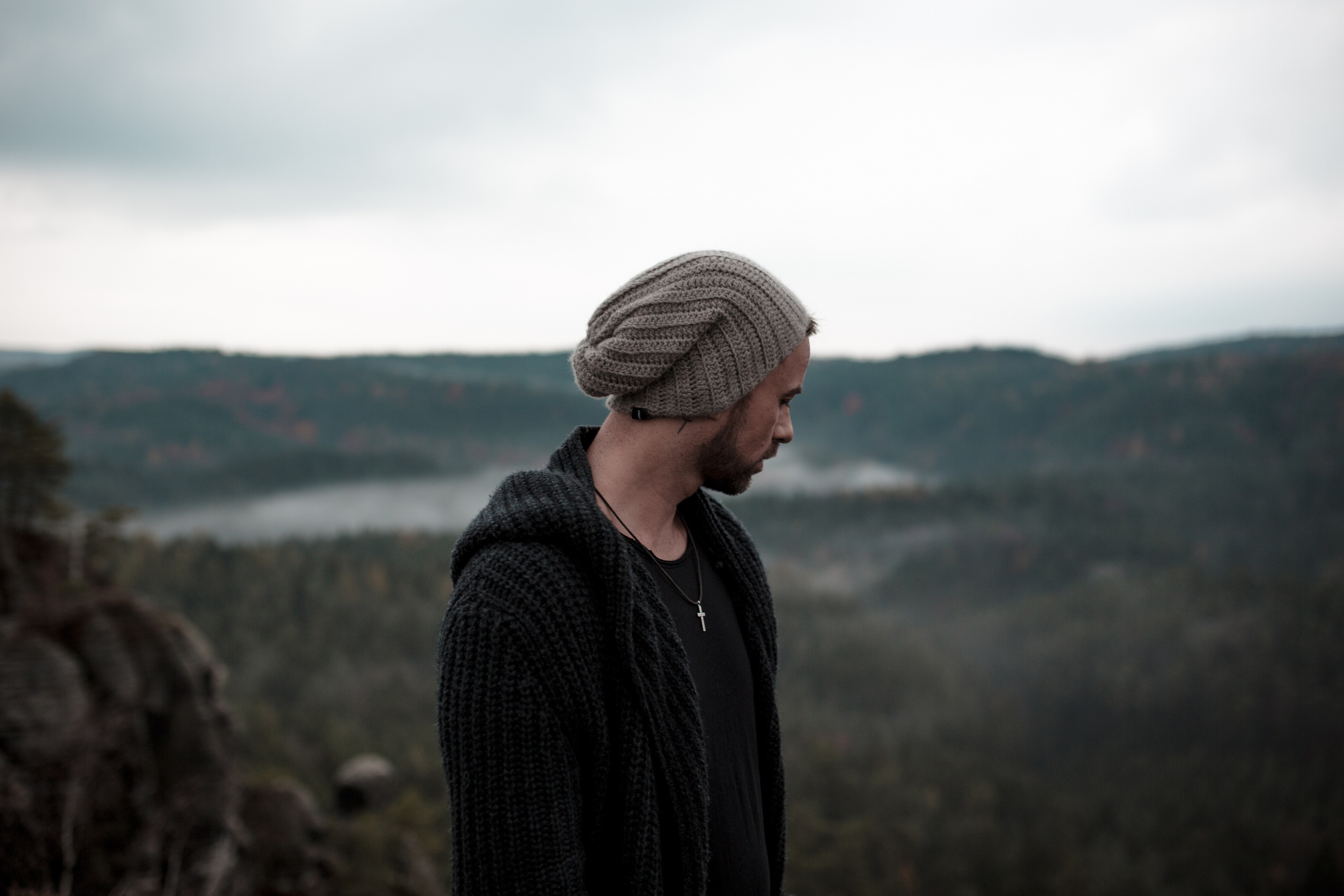 Pressefoto von Joel Brandenstein